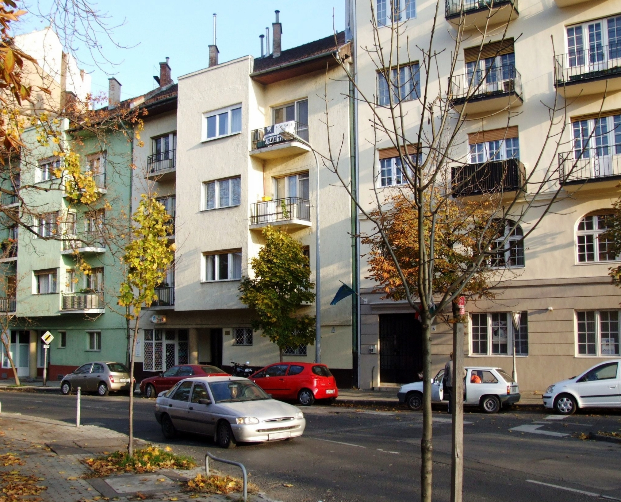 Szabó Lőrinc egykori emléktáblával megjelölt lakása mellett a Németvölgyi úton a világos színű, háromemeletes lakóház első emeletén lakott a György László-Móricz Lili házaspár.